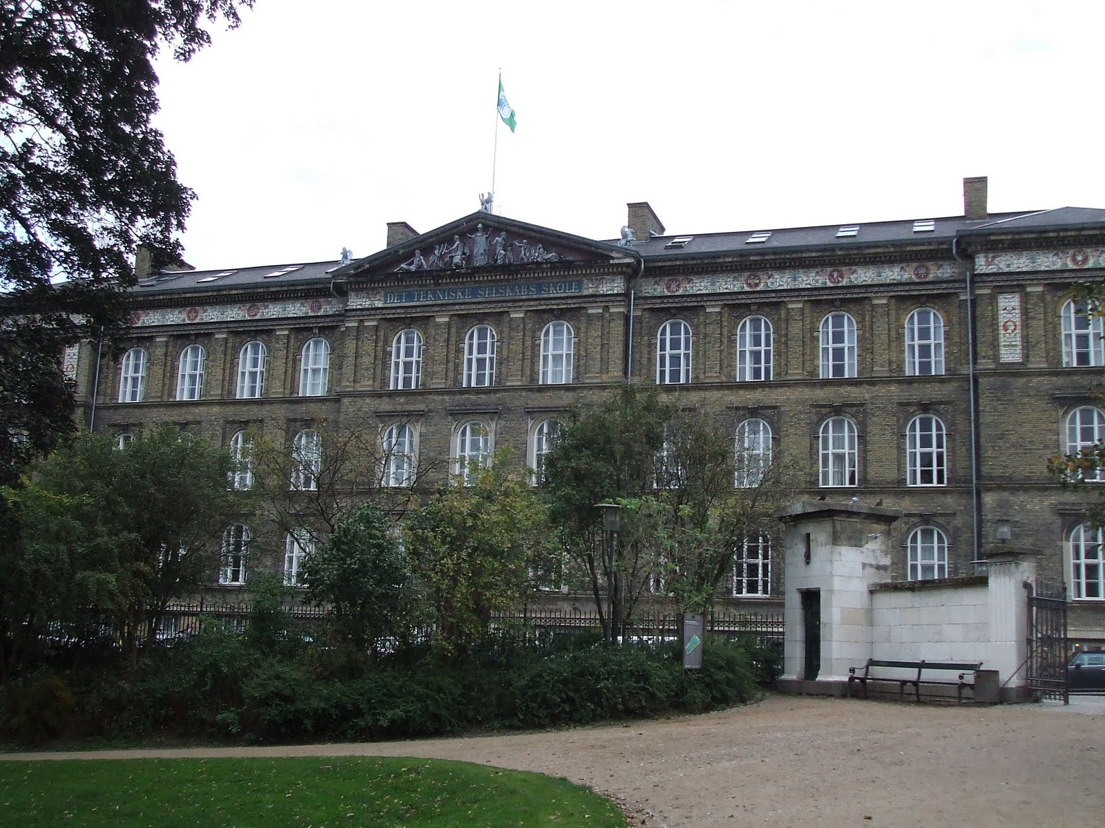 The former Det Tekniske Selskabs Skole in Copenhagen, Denmark